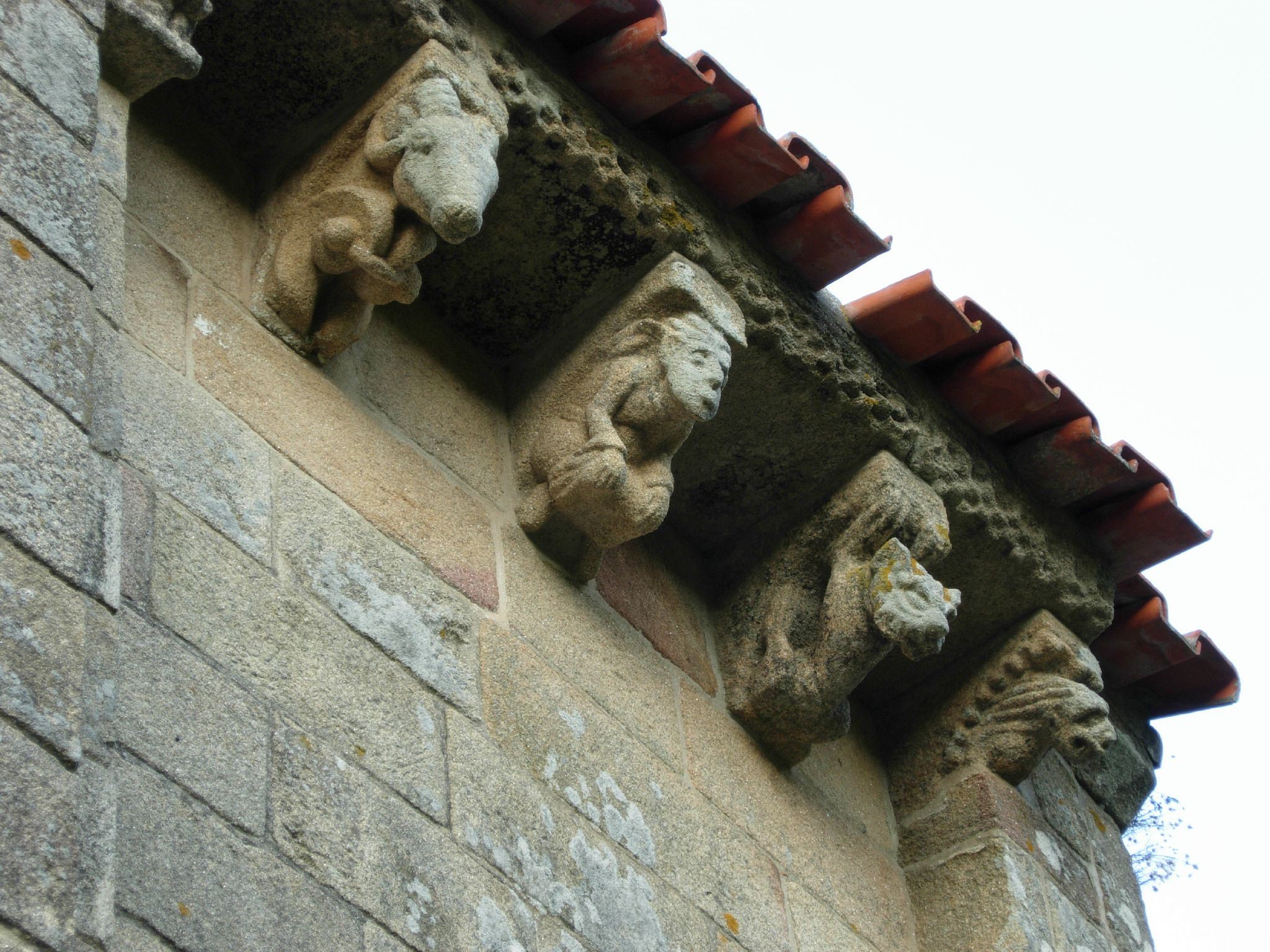 Canecillos en el muro sur del ábside.